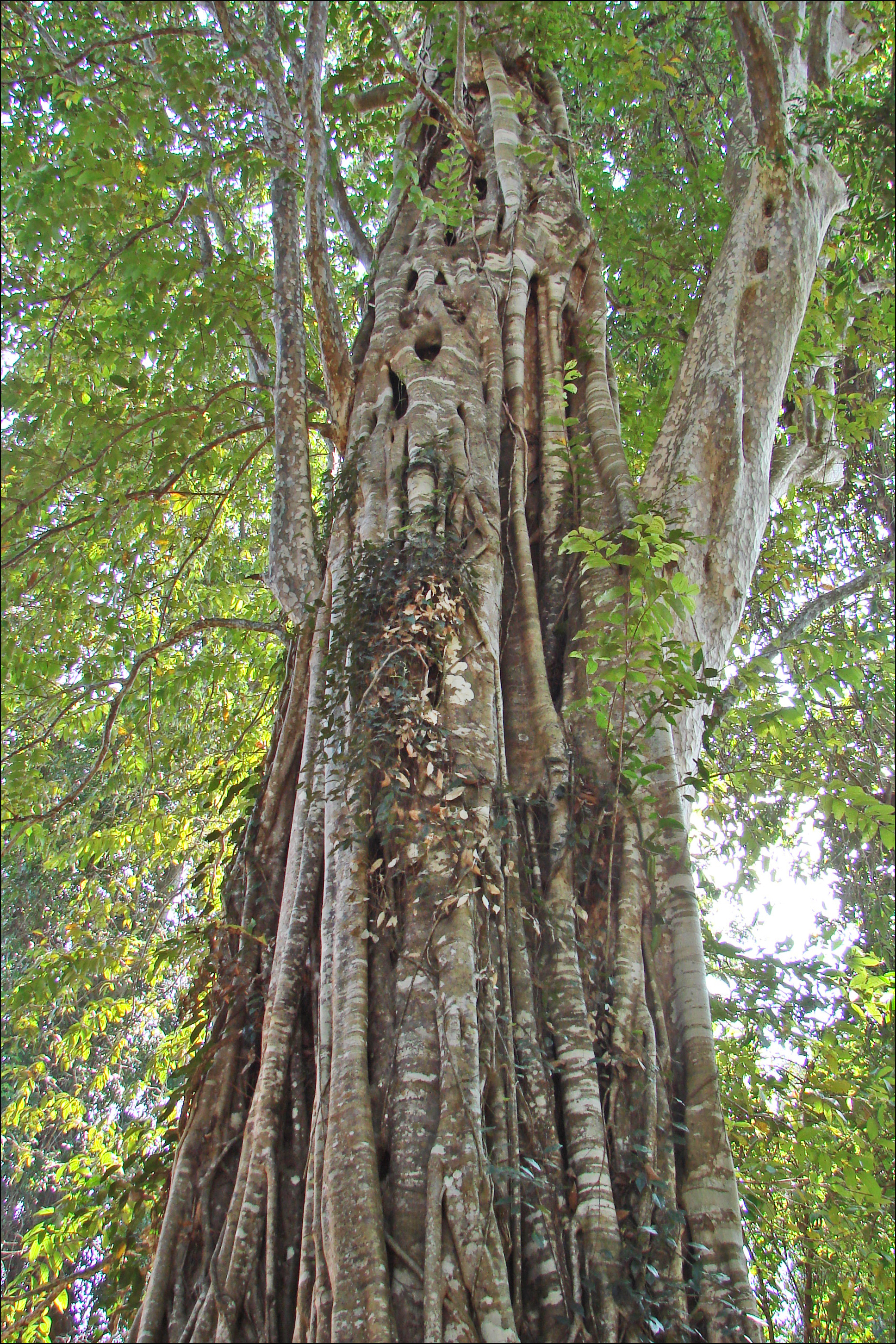 Sralao (Lagerstroemia calyculata) Lythraceae et Trang (Ficus altissima) Moraceae Lagerstroemia calyculata est un arbre pouvant atteindre 35 m de haut dans le sud-est asiatique, il a été parasité par un Ficus altissima qui l'enserre totalement.